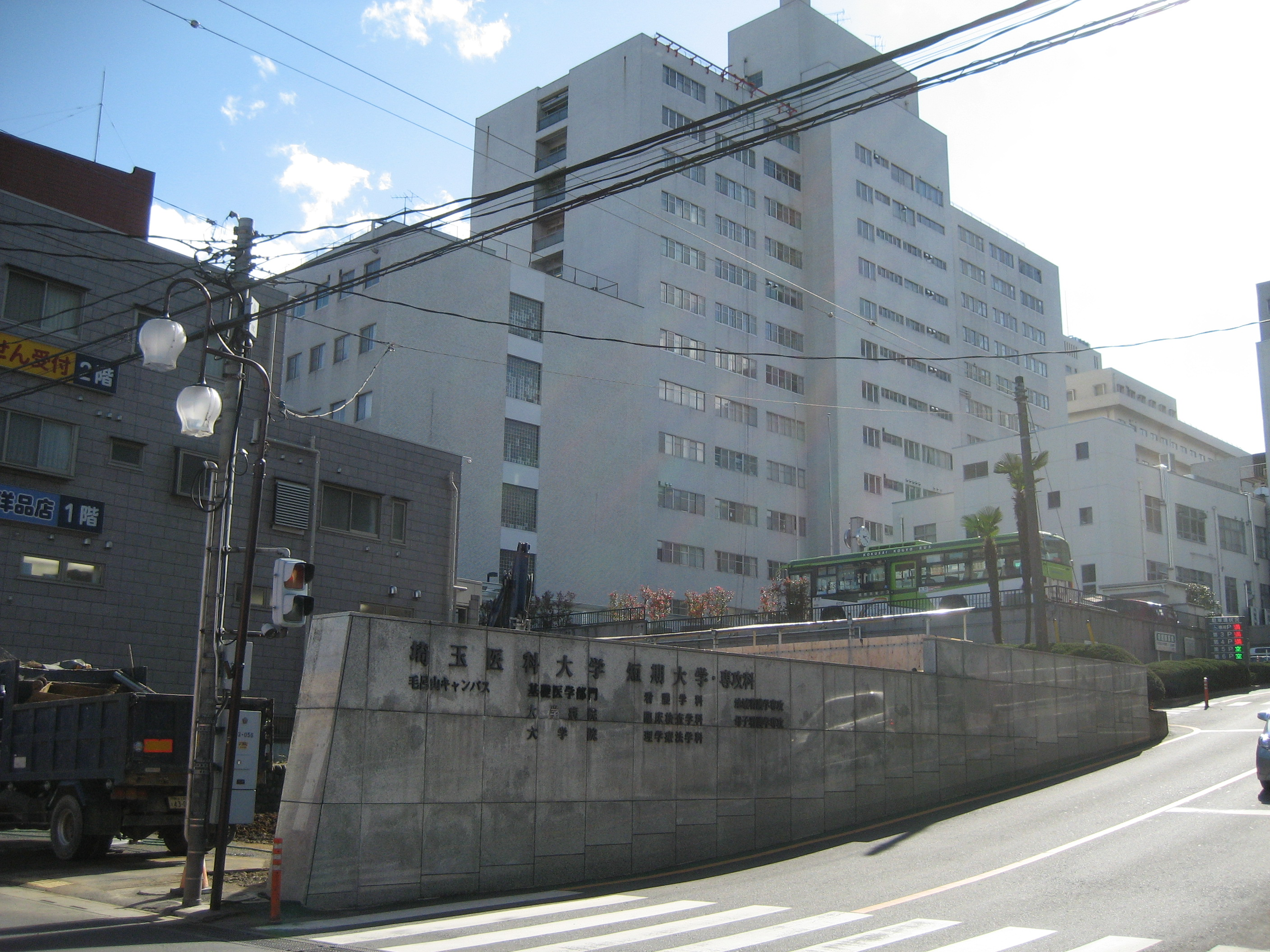 埼玉医科大学毛呂山キャンパス